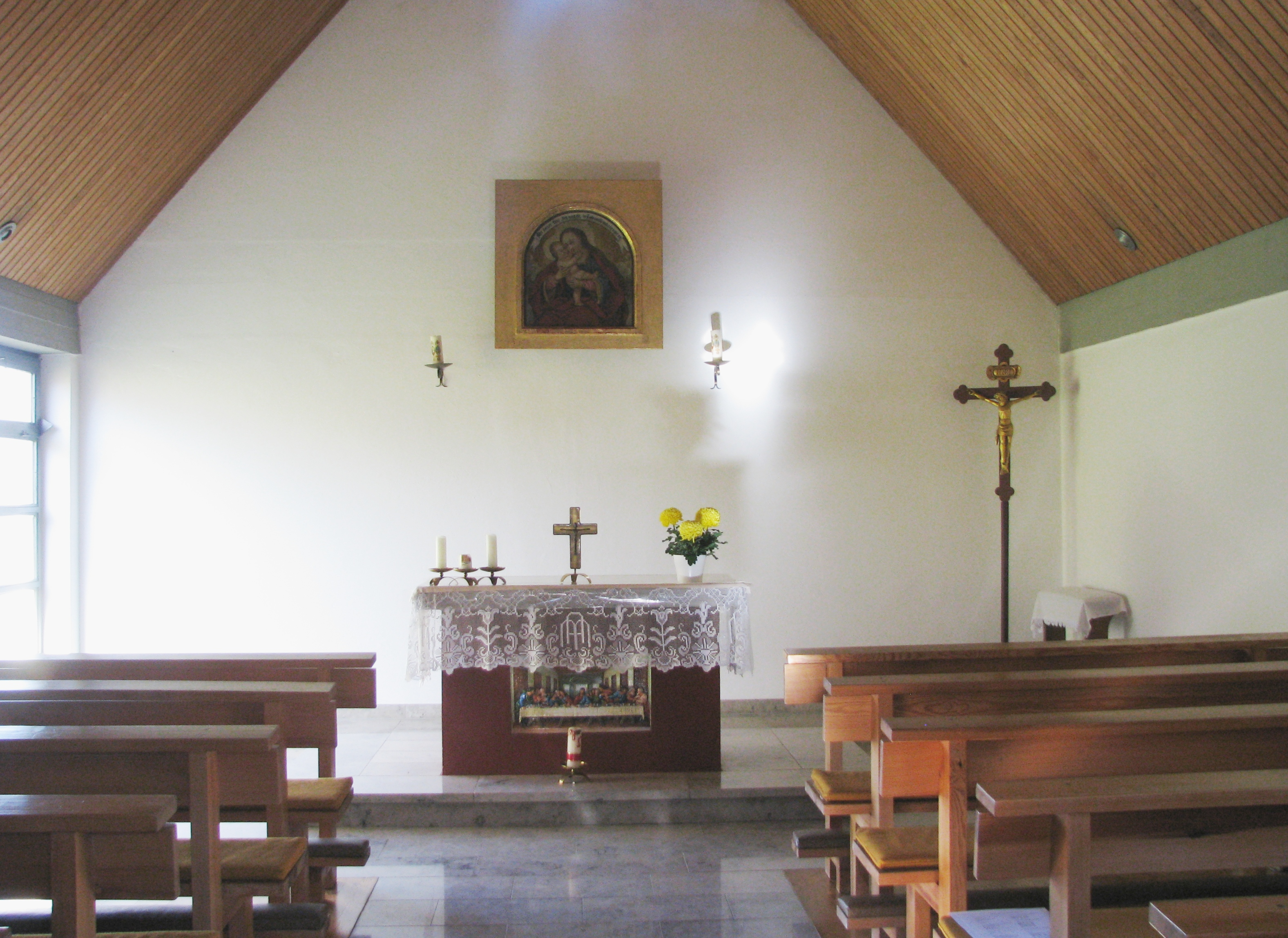 Tandl, Ortsteil von Hilpoltstein Im mittelfränkischen Landkreis Roth